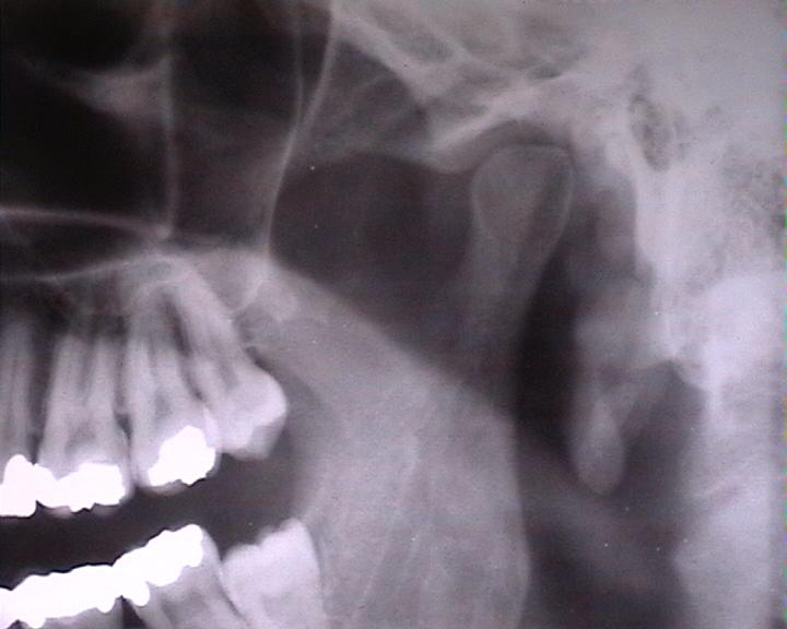 Die hellen Bereiche auf den Zähnen sind Füllungen, der nicht durchgebrochene Zahn ist ein Weisheitszahn.